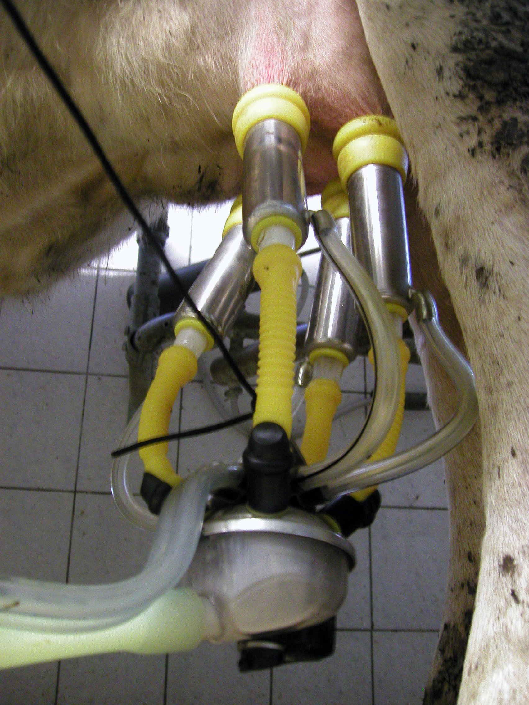 Tirage du lait de vache dans une laiterie de la loire.